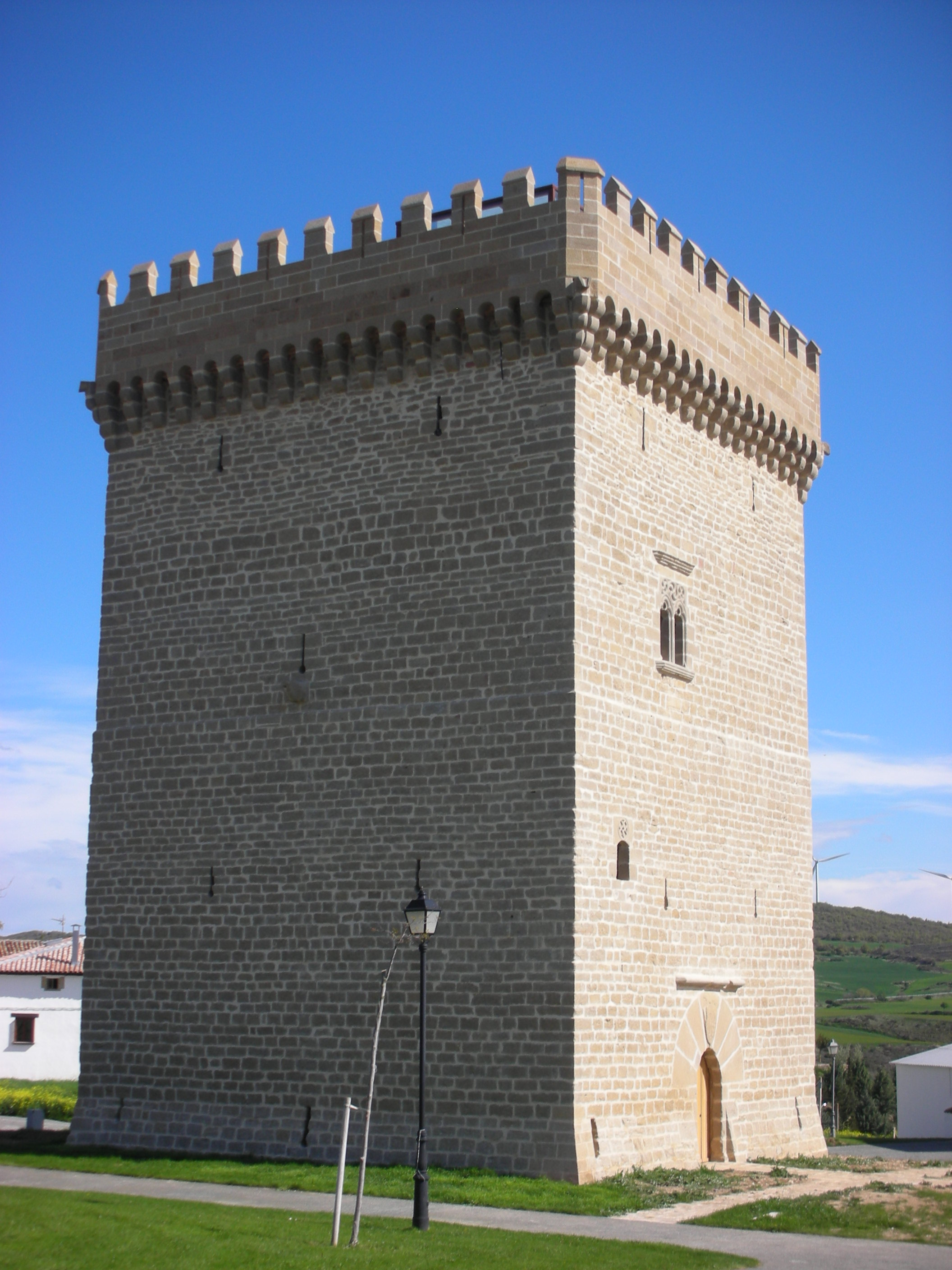 Torre medieval de Olcoz, en Navarra (España)